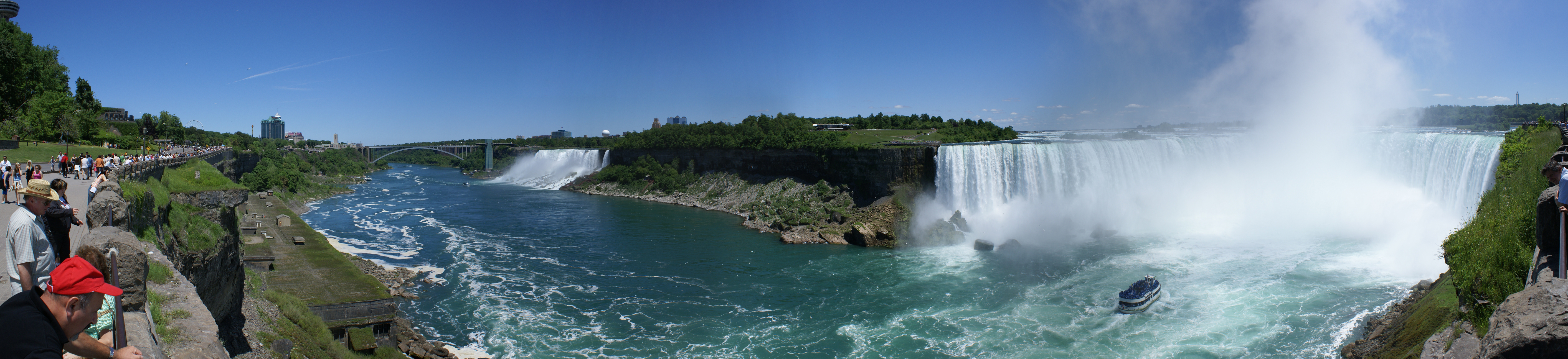 Niagara falls panorama from Canadian side